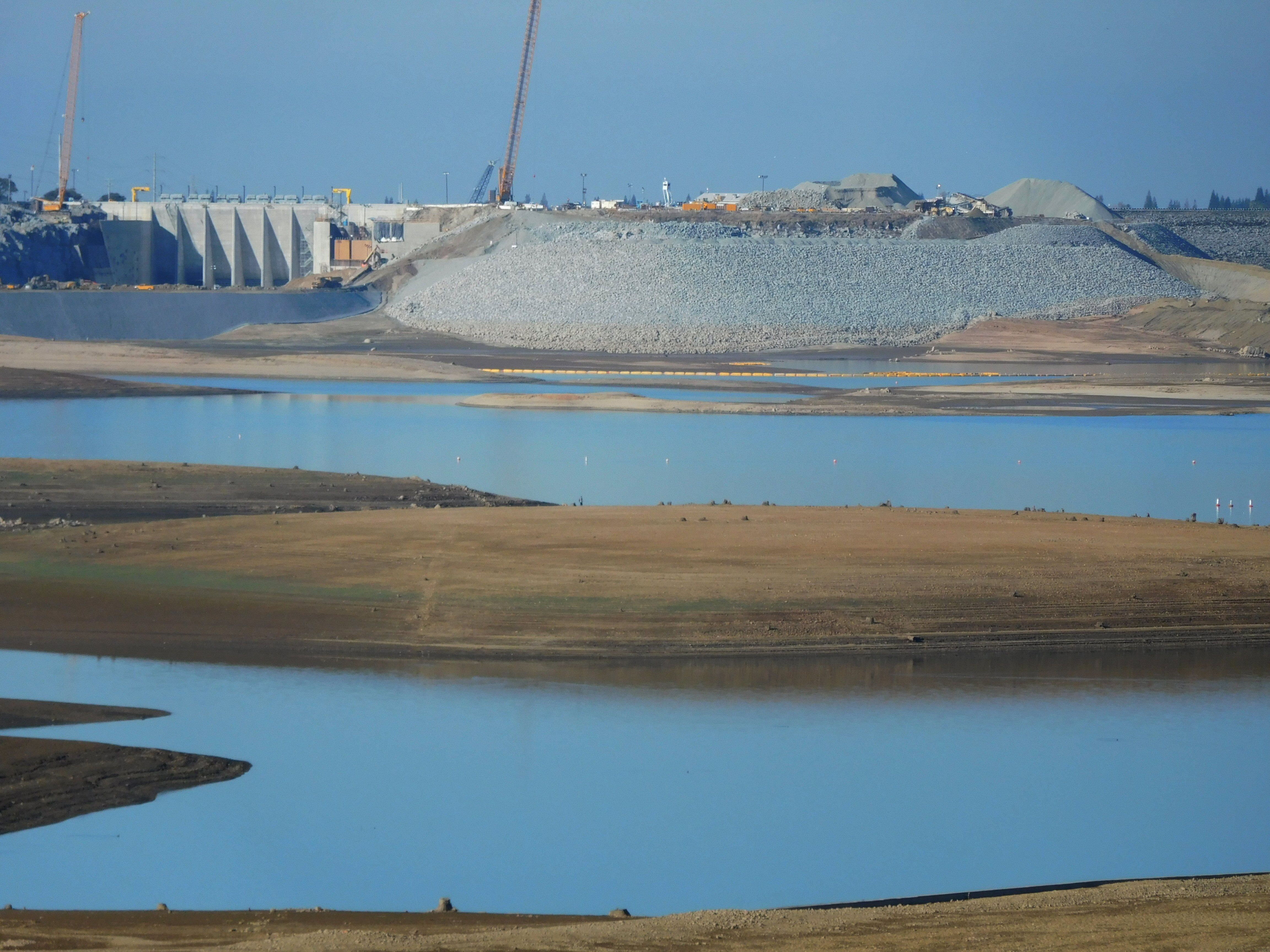 Folsom Lake 58: Nov. 2015